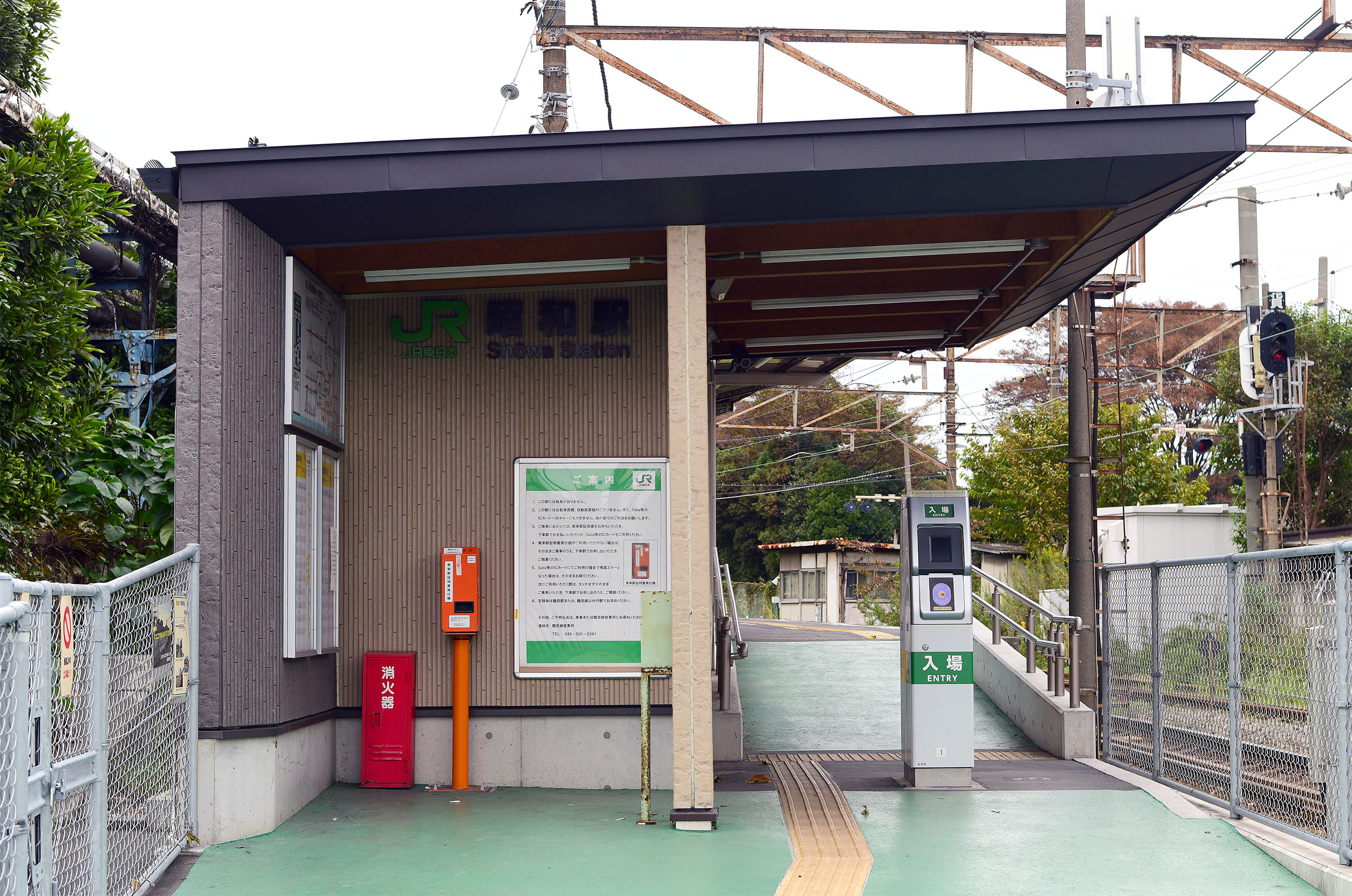 東日本旅客鉄道株式会社鶴見線昭和駅駅舎